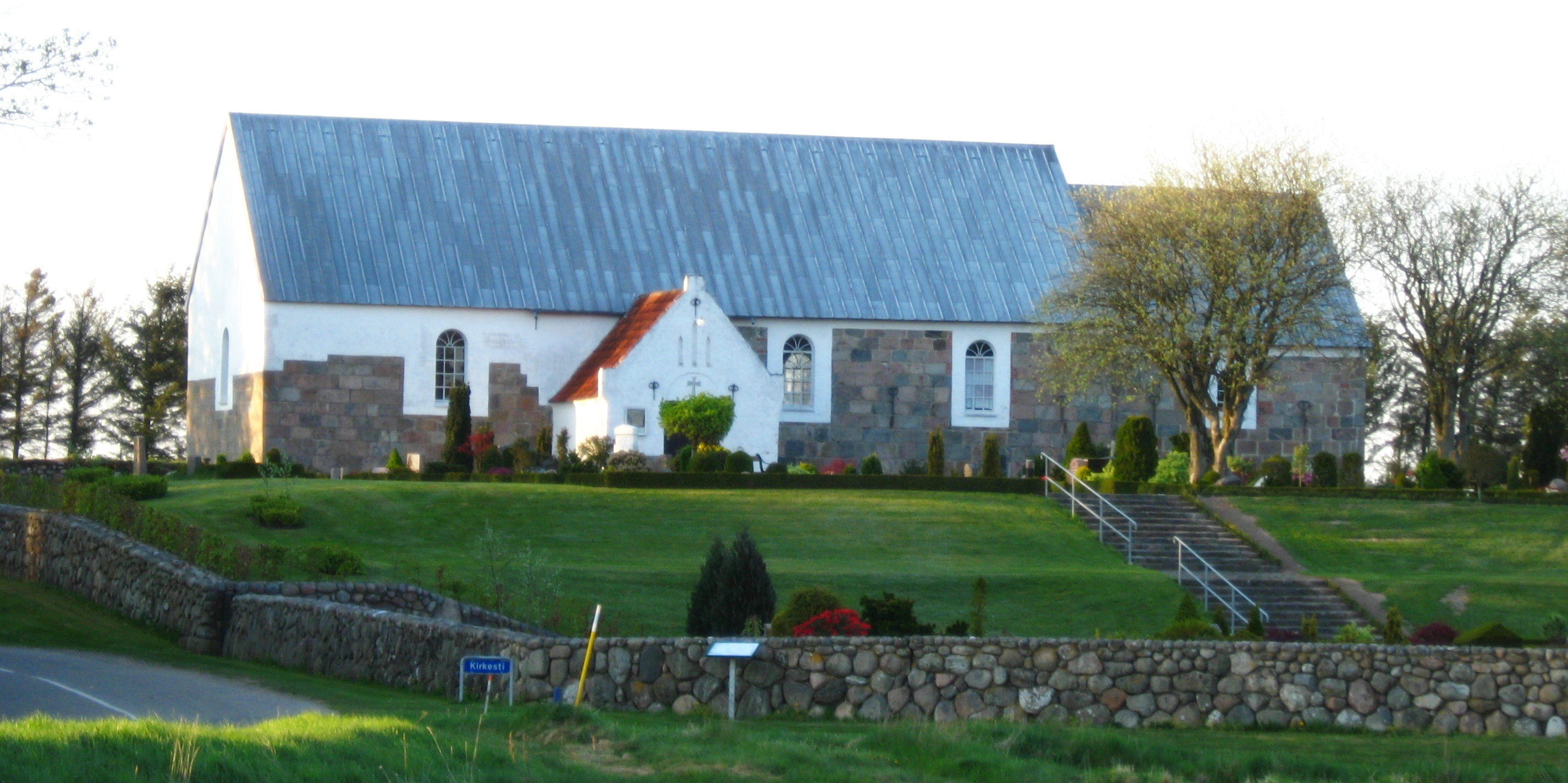 Jelstrup Kirke (Hjørring Kommune), genskabt i 2006 ved frivilligt arbejde